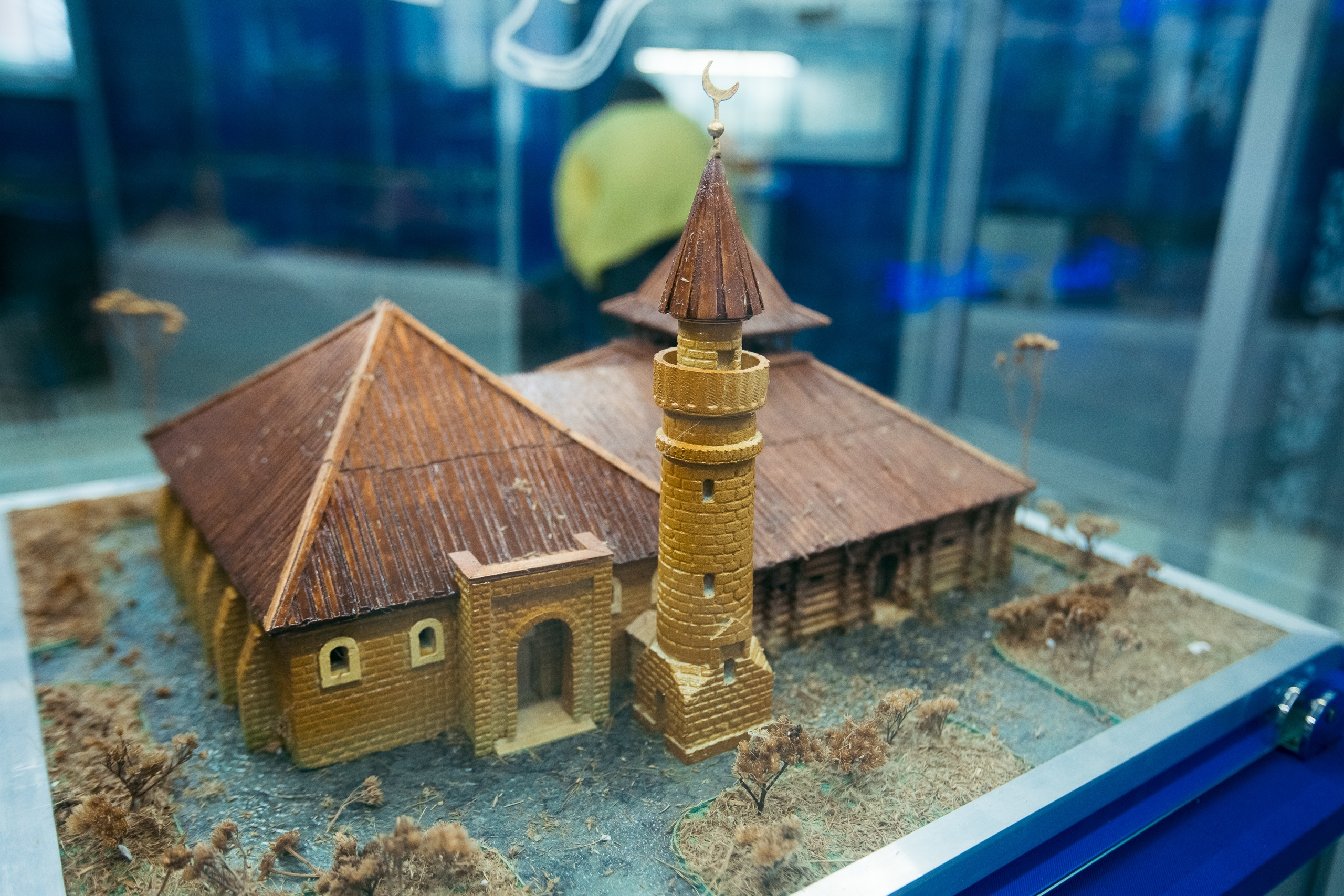 Татарча/tatarça: Тарихи-археологик музее эчендә